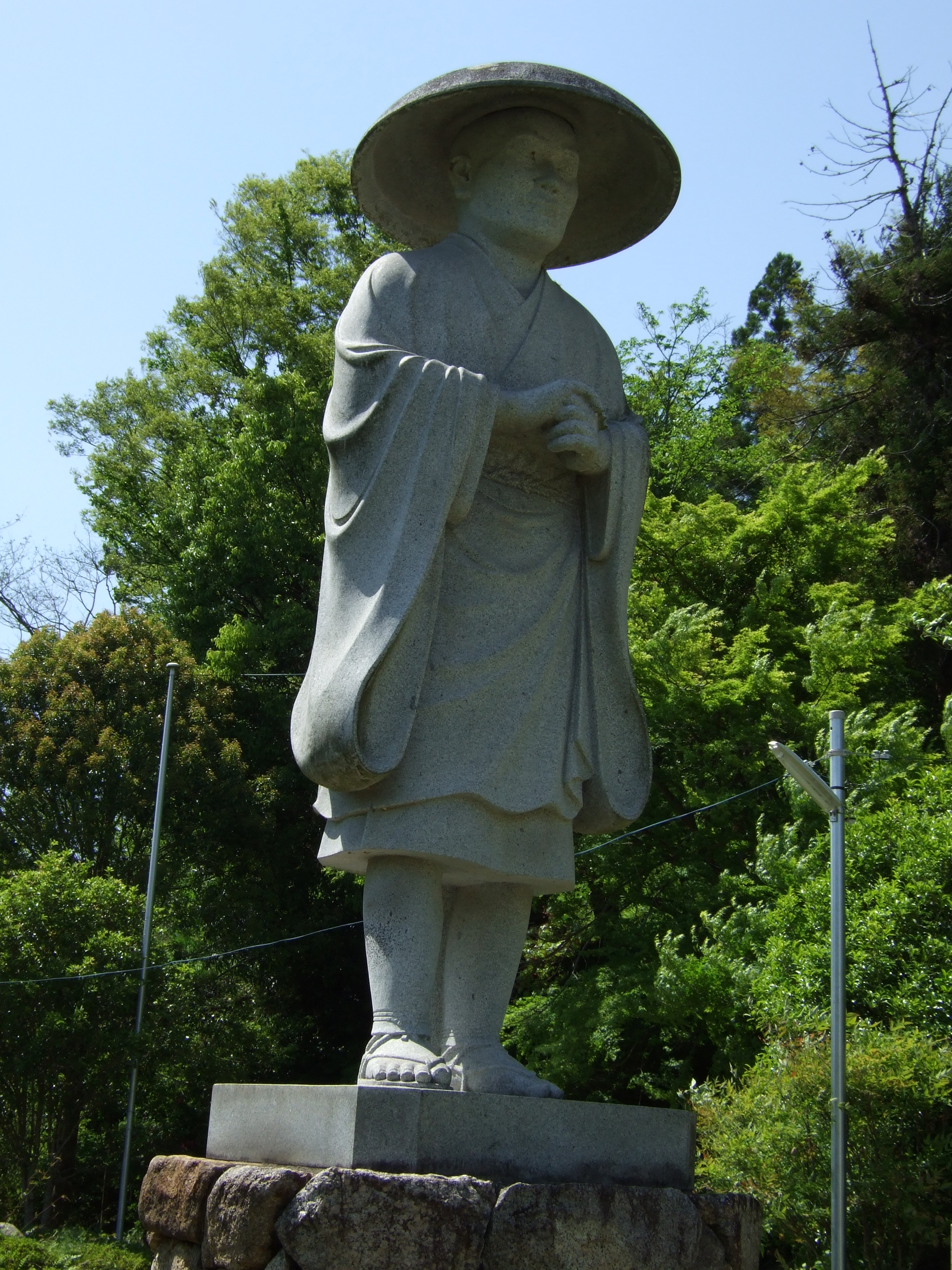 円仁湯郷